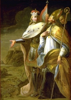 Deckengemälde: Übernahme des Stiftes Melk durch die Benediktiner (Kolomanisaal des Stiftes Melk). Der Ausschnitt zeigt Leopold II. von Österreich und Sigibold, Abt von Melk